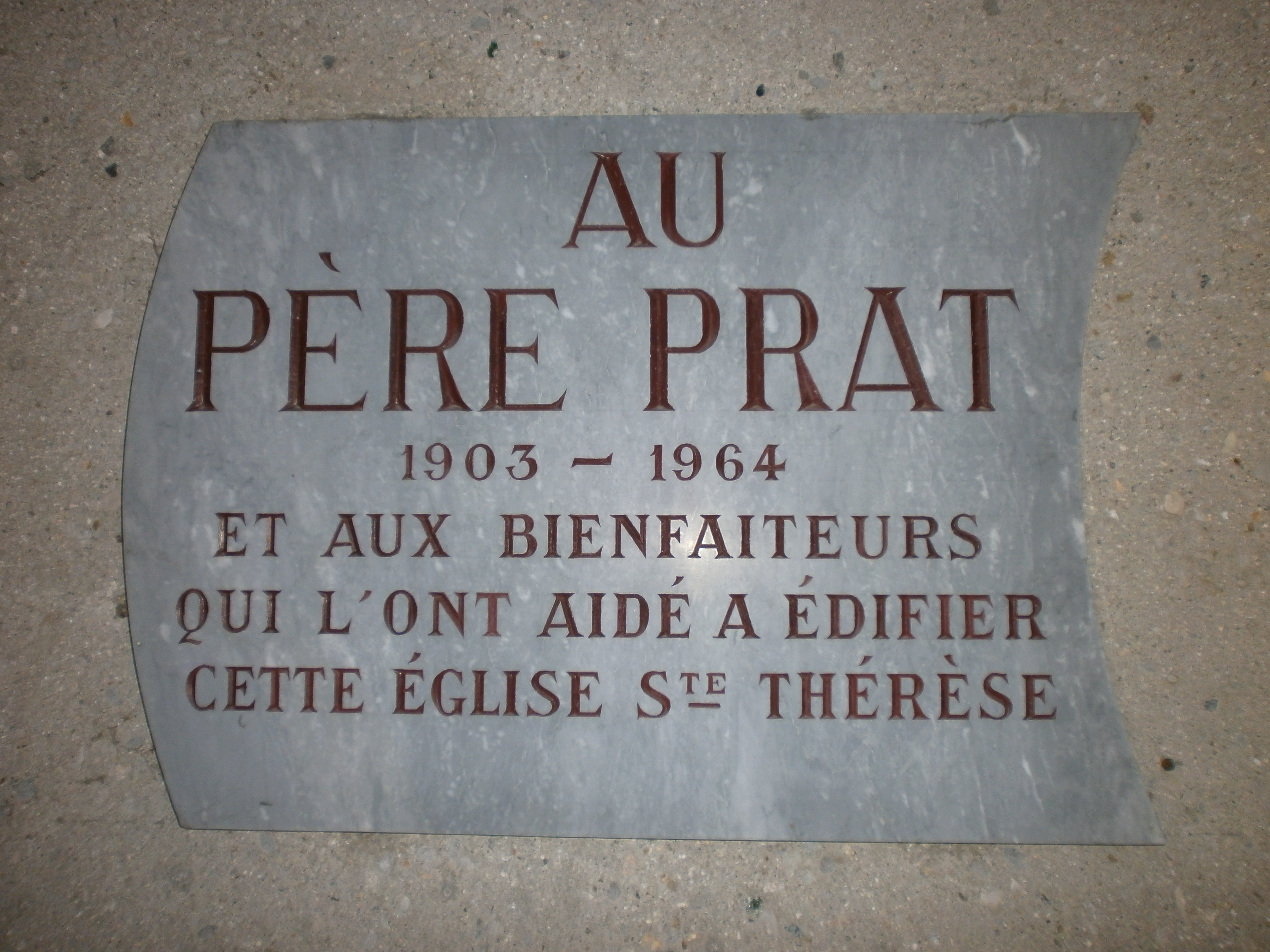 Eglise Sainte-Thérèse Guilherand-Granges, plaque commémorative.